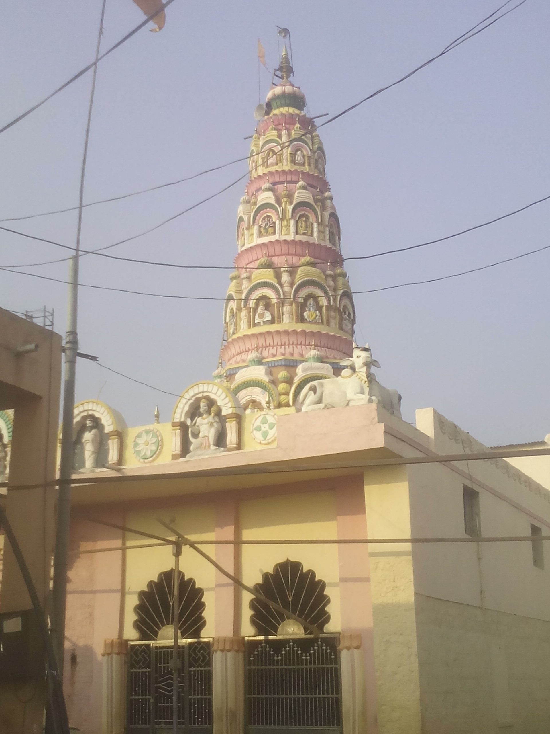 समोरून मंदिराचा नजरा